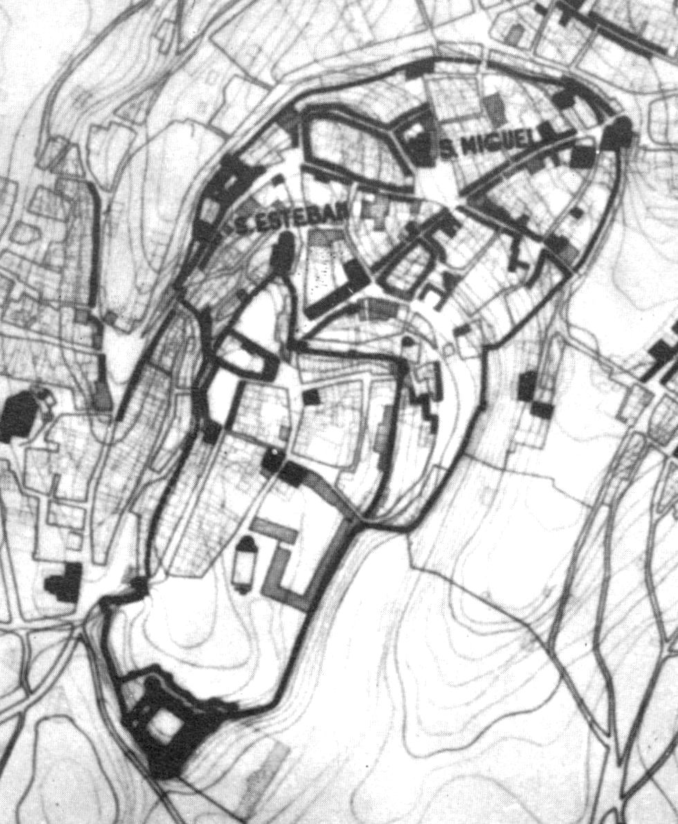 Detalle de la planta de la Muralla de Cuéllar en un plano de la Villa del siglo XIX.